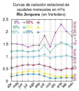 Curva de Variación Estacional del río Jorquera en Vertedero. # cita publicación # | apellido = Dirección General de Aguas # | nombre = # | enlace-autor = Ministerio de Obras Públicas (Chile) # | título = Diagnóstico y clasificación de los cursos y cuerpos de agua según objetivos de calidad. Cuenca Río Jorquera # | ubicación = Santiago de Chile # | editorial = Ministerio de Obras Públicas (Chile) # | año = 2004 # | edición = # | url = # | urlarchivo = # | fechaarchivo = # | ref = harv # Tabla 4.3 (m3/s) pág. 38 mes 5% 10% 20% 50% 85% 95% abr 1.529 1.213 0.916 0.536 0.277 0.188 may 1.509 1.232 0.964 0.603 0.339 0.241 jun 1.478 1.233 0.988 0.643 0.371 0.264 jul 1.388 1.185 0.976 0.664 0.399 0.288 ago 1.455 1.218 0.983 0.651 0.393 0.292 sep 1.449 1.241 1.024 0.696 0.405 0.273 oct 1.839 1.447 1.081 0.620 0.313 0.209 nov 1.392 1.167 0.933 0.579 0.265 0.122 dic 1.966 1.434 0.978 0.471 0.191 0.113 ene 2.299 1.569 0.998 0.445 0.198 0.141 feb 2.016 1.497 1.044 0.524 0.224 0.136 mar 1.815 1.371 0.976 0.510 0.229 0.143 This plot was created with Gnuplot.